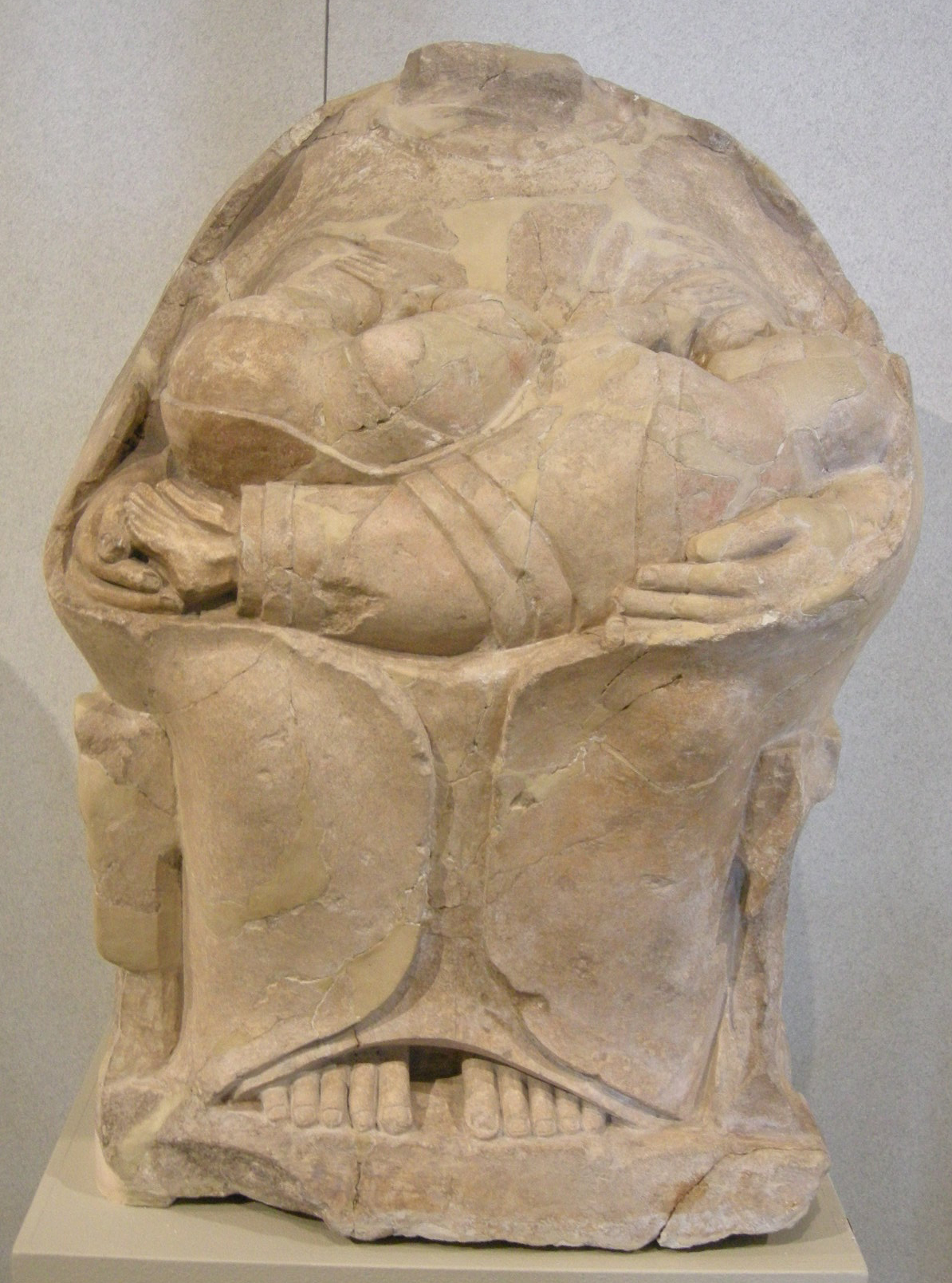 Museo archeologico regionale di Siracusa Paolo Orsi. Dea madre in calcare che allatta due gemelli, da Megara Hyblaea necropoli ovest, 550 ac.